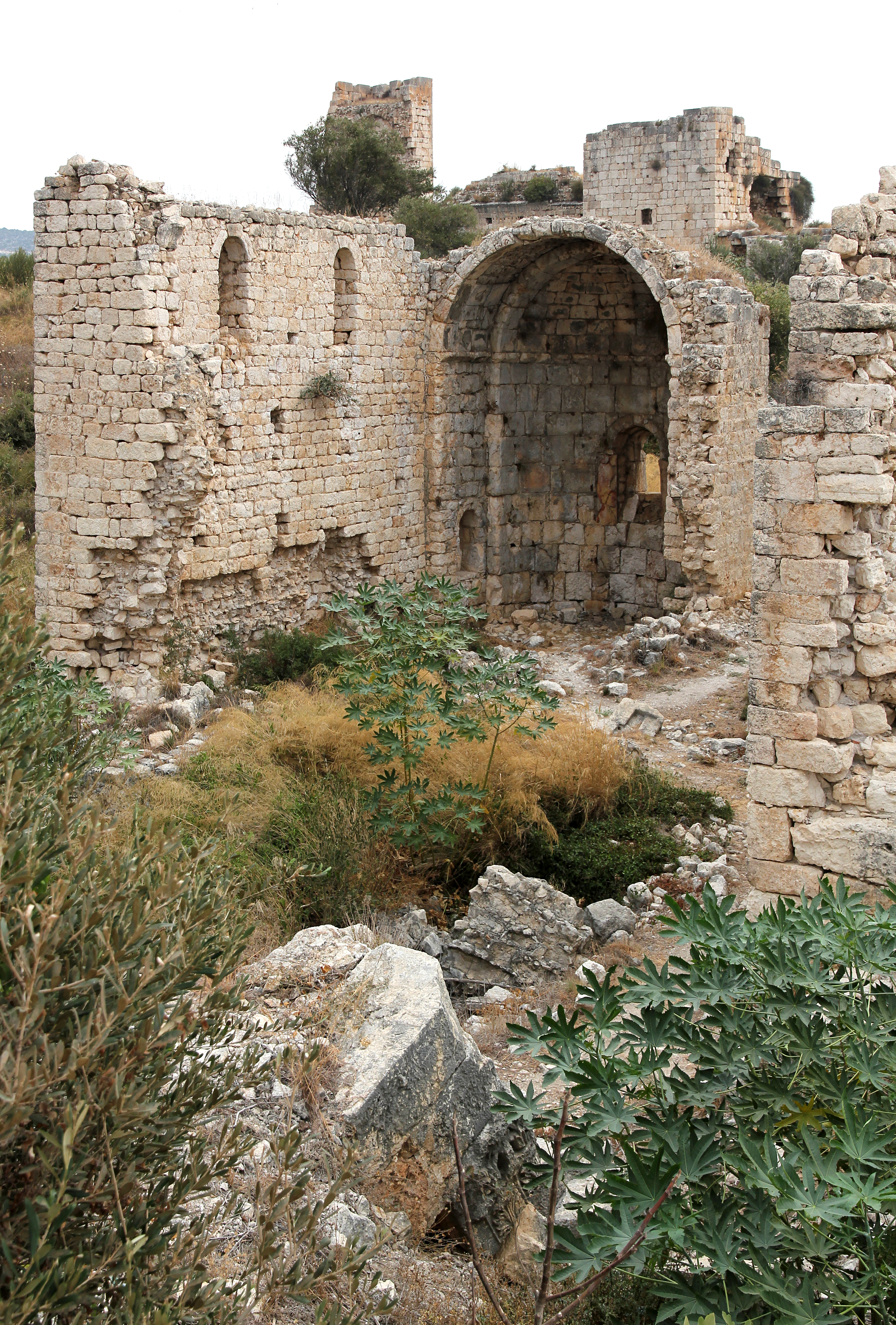 Korykos, Landburg bei Kızkalesi, Südtürkei, Südwestkapelle